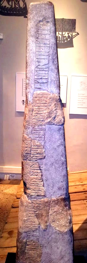 Runestein med innskrift: "Arnstein reiste denne steinen etter Bjor, sønnen sin. Han fant døden i hæren, da Knut angrep England". Steinen står på Historisk Museum, Oslo; Knut den Store angrep England i 1015.